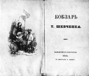 Обкладинка першого видання "Кобзаря"